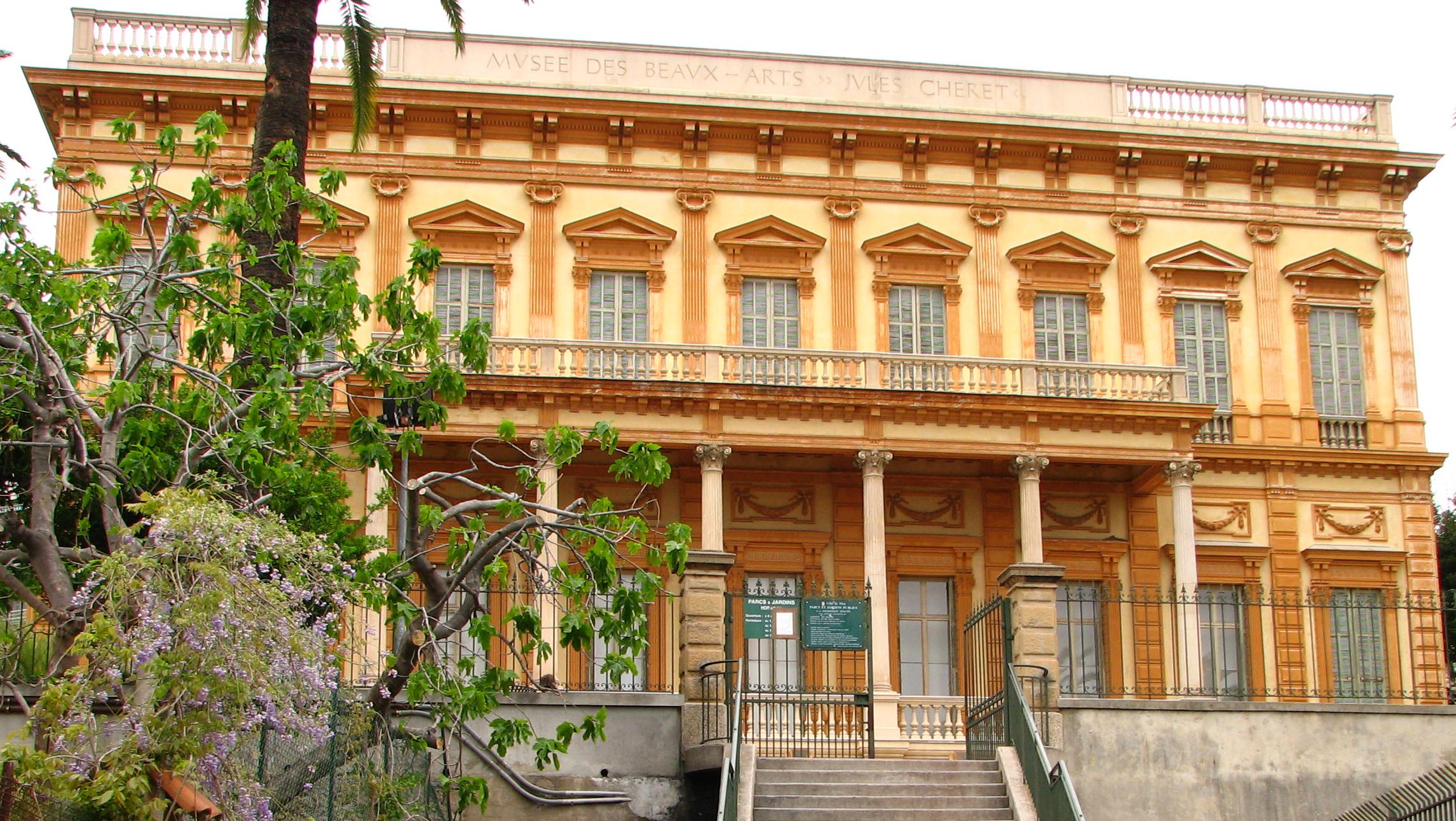 Nicea, Muzeum Sztuk Pięknych